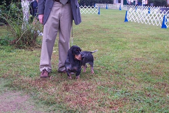 Basset Bleu de Gascogne "Reymar's Madame Cholet de Wimbledon"